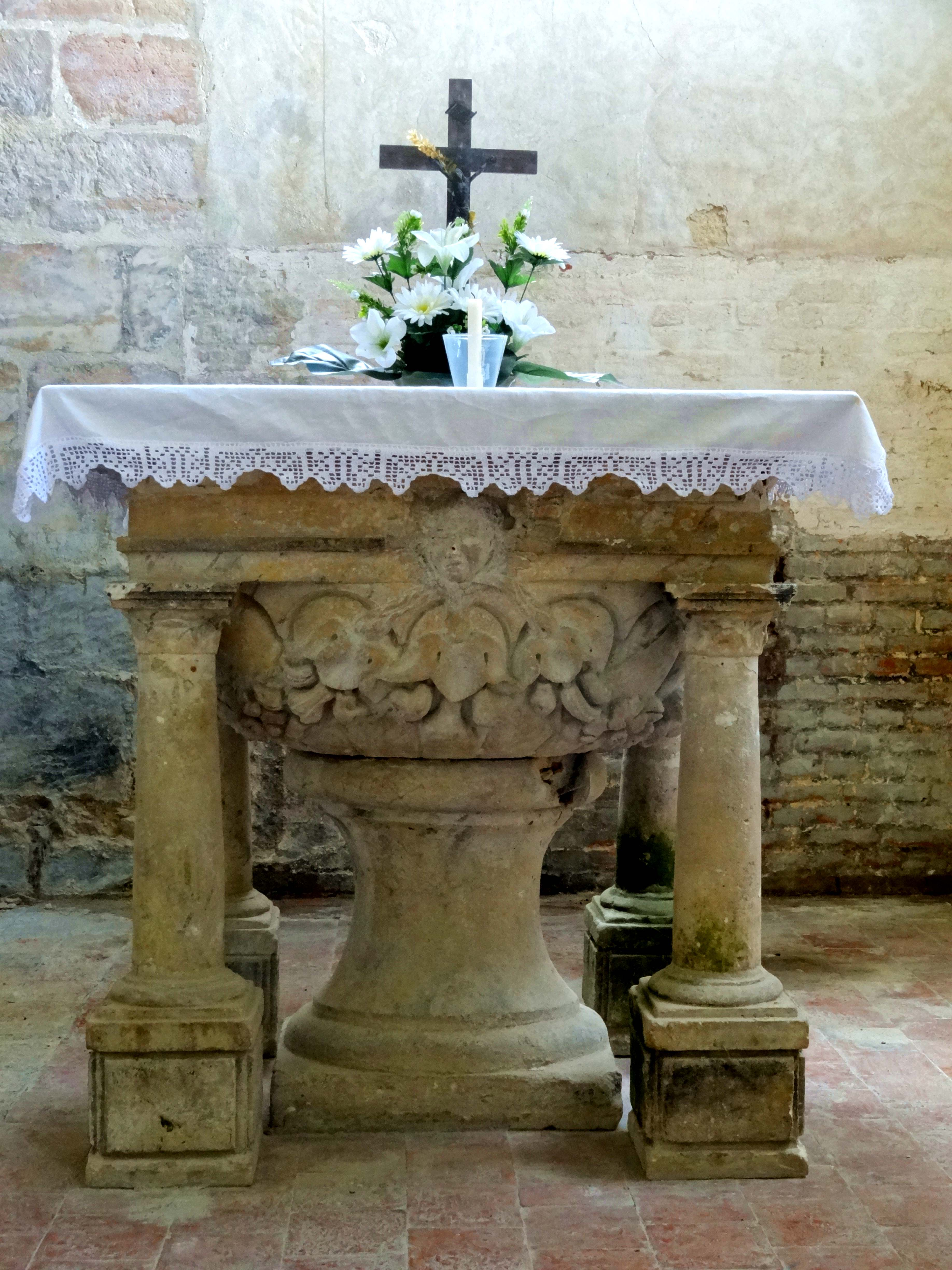 Mobilier de l'église - voir titre.